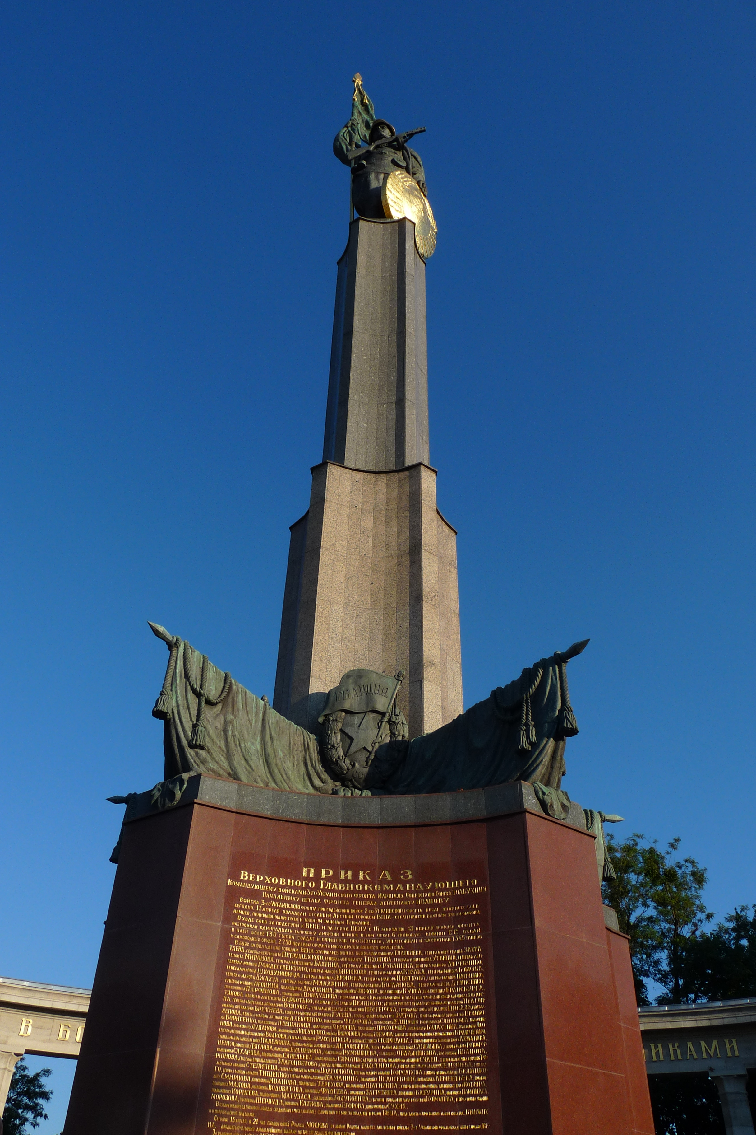 Vienna